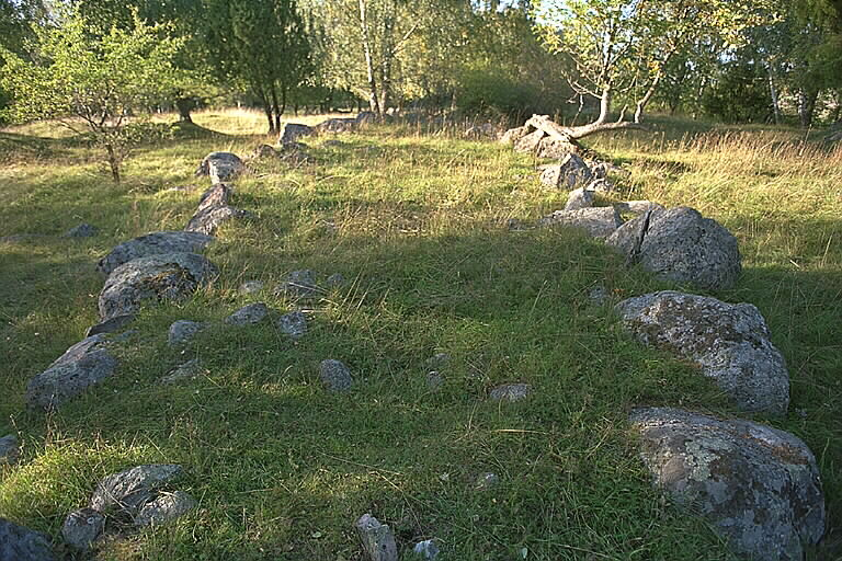 Skeppssättning N om Björkö by. Motiv: Björkö-Birka Nyckelord: Raä-Fastigheter, Världsarv Kategori: Stenkrets/domarring/skeppssättning Skeppssättning N om Björkö by.